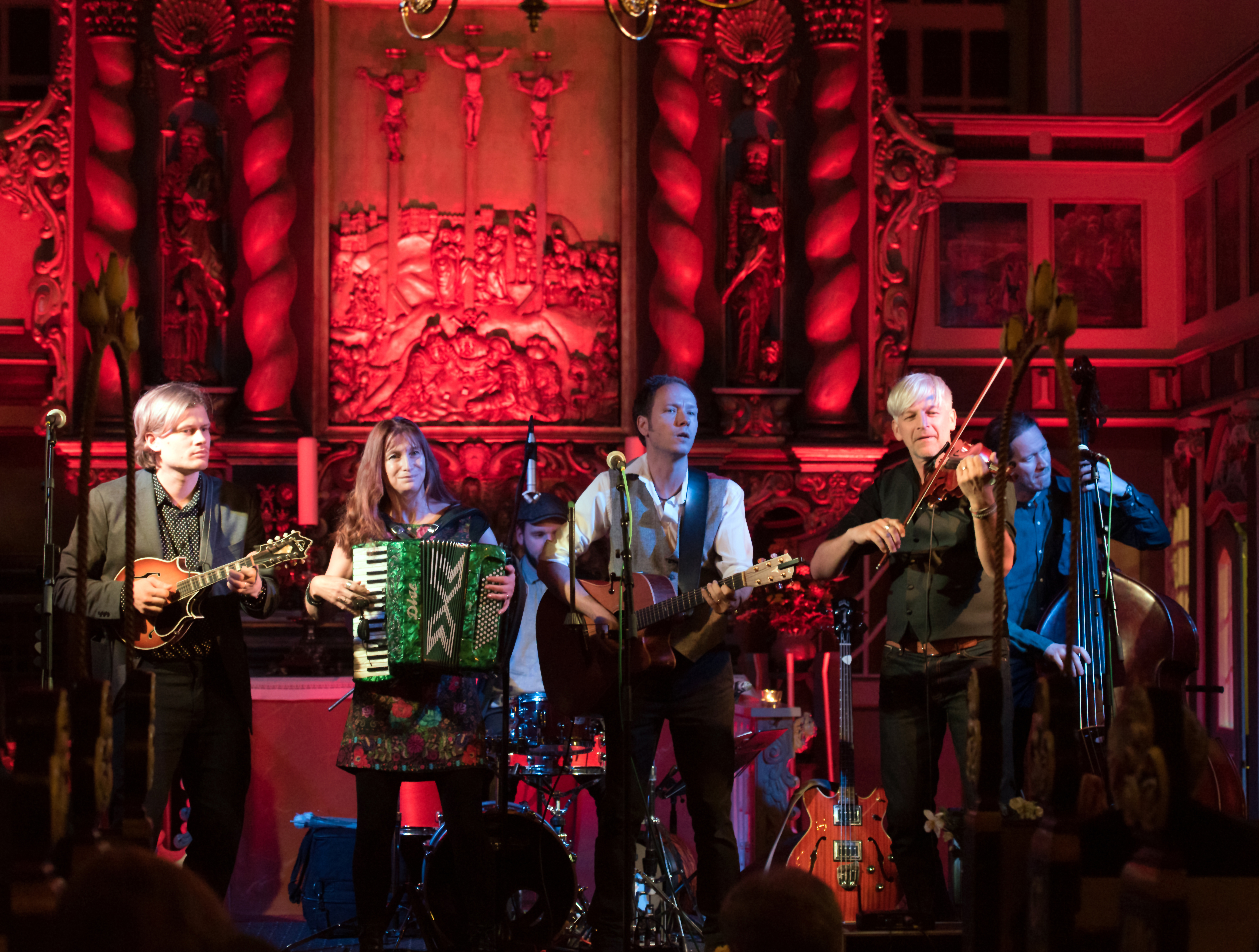 West of Eden bei Lottes Musiknacht in der Nikolaikirche in Elmshorn 2017